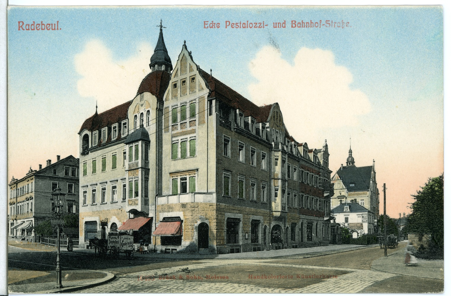 Radebeul; Ecke Pestalozzi - und Bahnhofstraße This postcard is from publisher Brück & Sohn in Meißen ( postcard has a unique number 10498 and is available in a higher resolution at the publisher. This images was uploaded in a cooperation project between Wikipedians and the publisher.